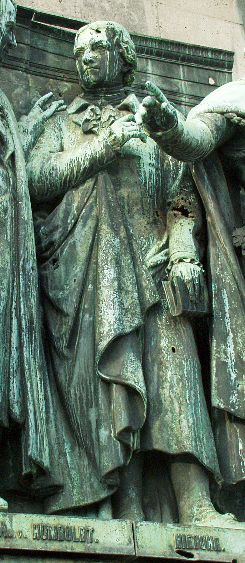 Friedrich Wilhelm III--Reiterstandbild auf dem Kölner Heumarkt.Detail: Barthold Georg Niebuhr